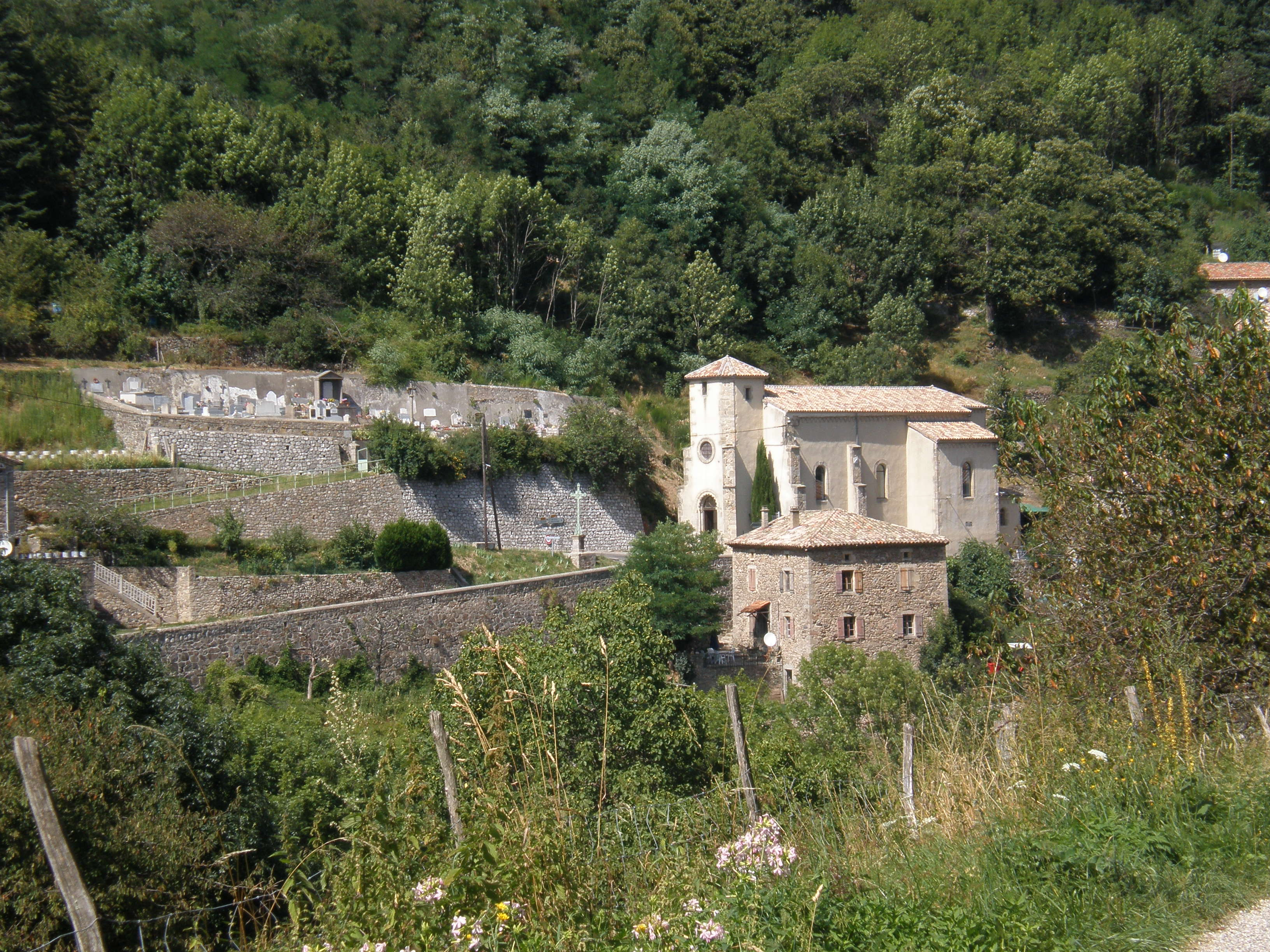 Eglise de Gourdon (Ardèche)